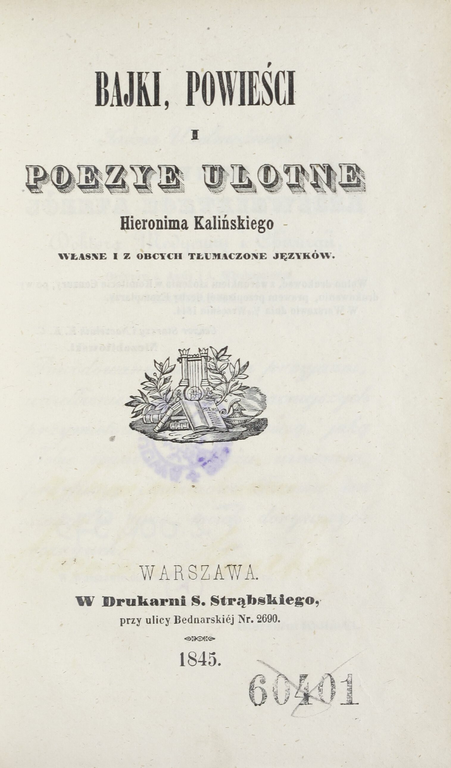 [34], 409, [8] s. ; 18 cm